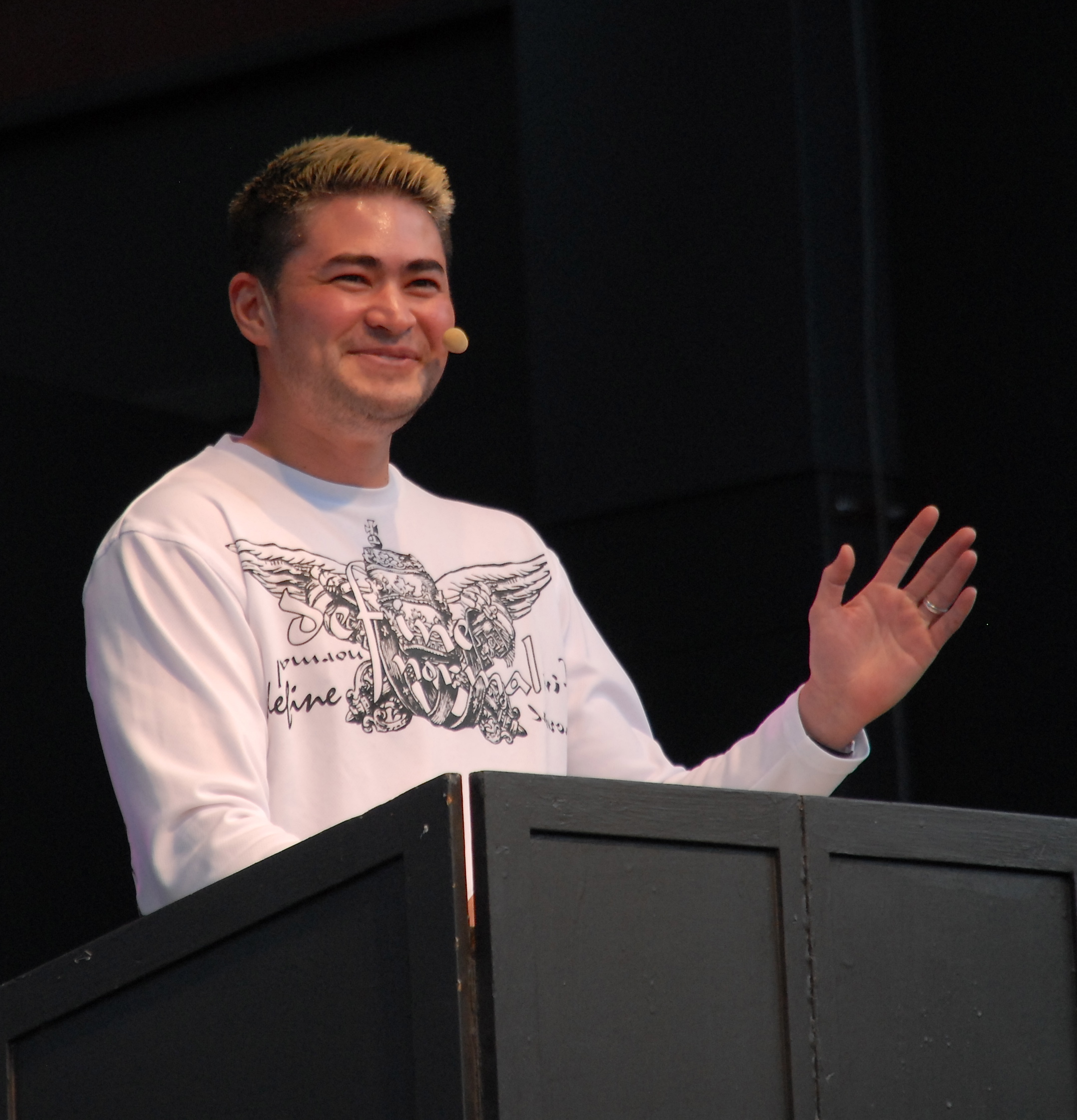 Thomas Beatie talar på Stockholm Pride 1 augusti 2011.